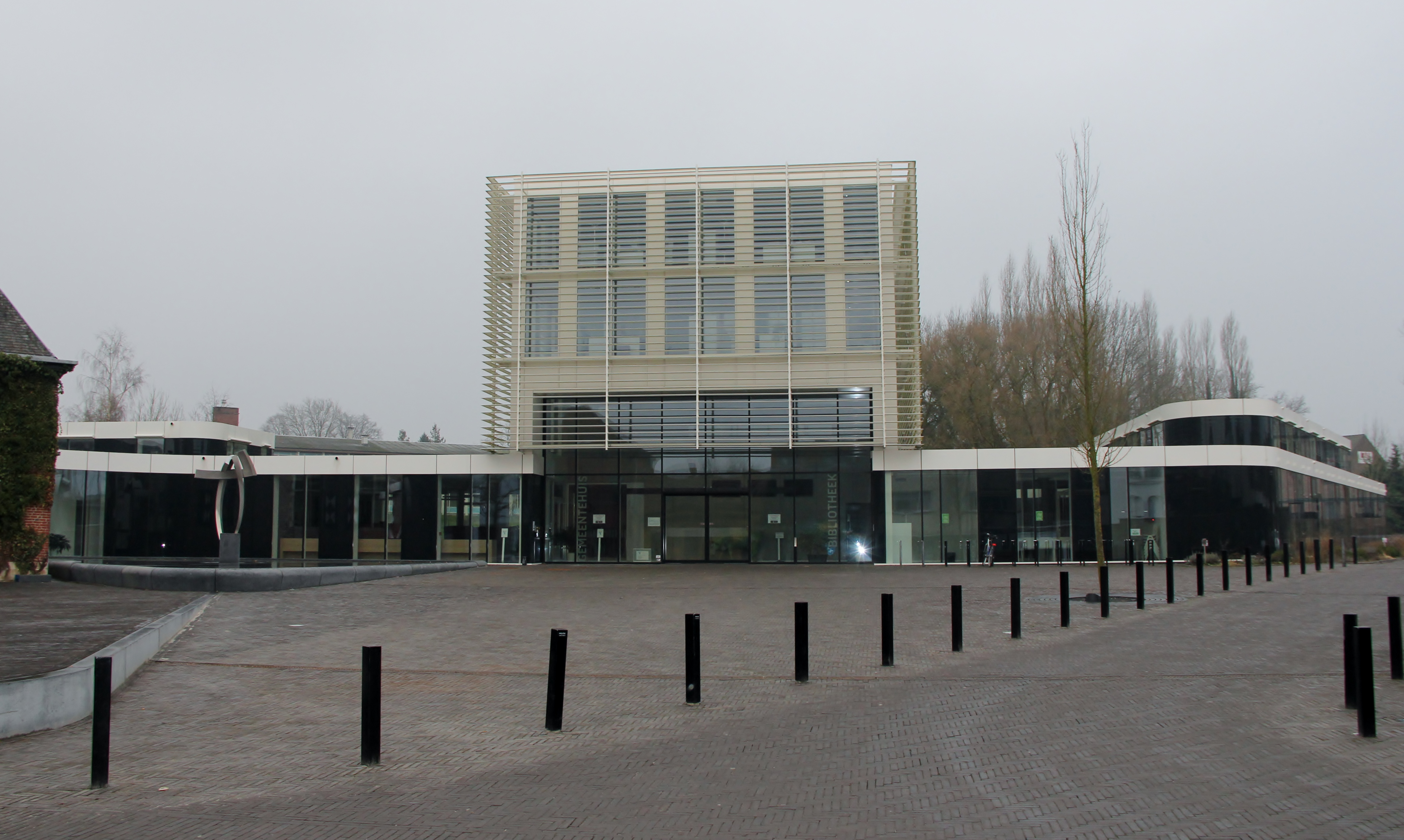 Het (nieuwe) Gemeentehuis - foto genomen op 02/2017